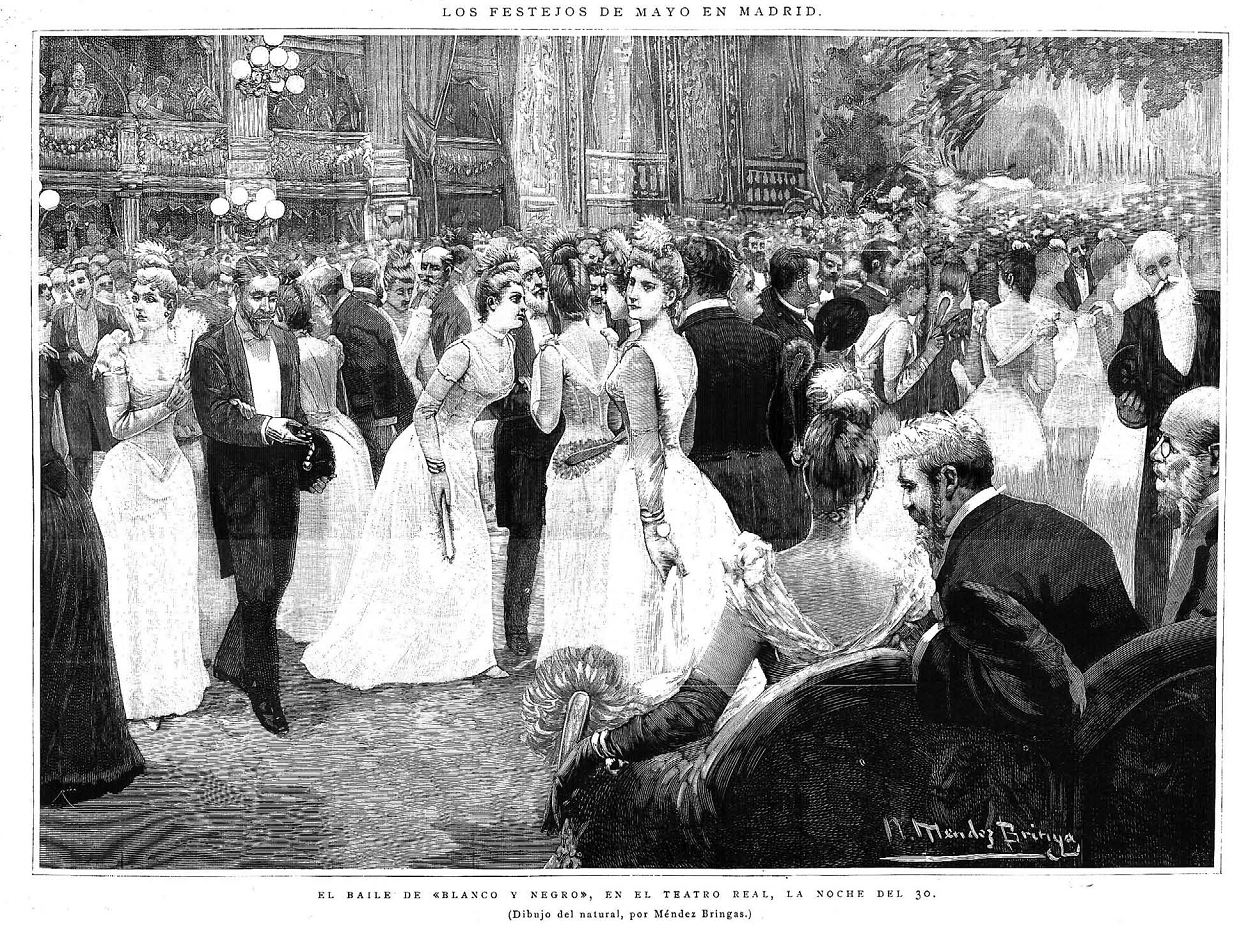 El baile de «Blanco y Negro», en el Teatro Real, la noche del 30, dibujo del natural de Narciso Méndez Bringa, en la revista La Ilustración Española y Americana.